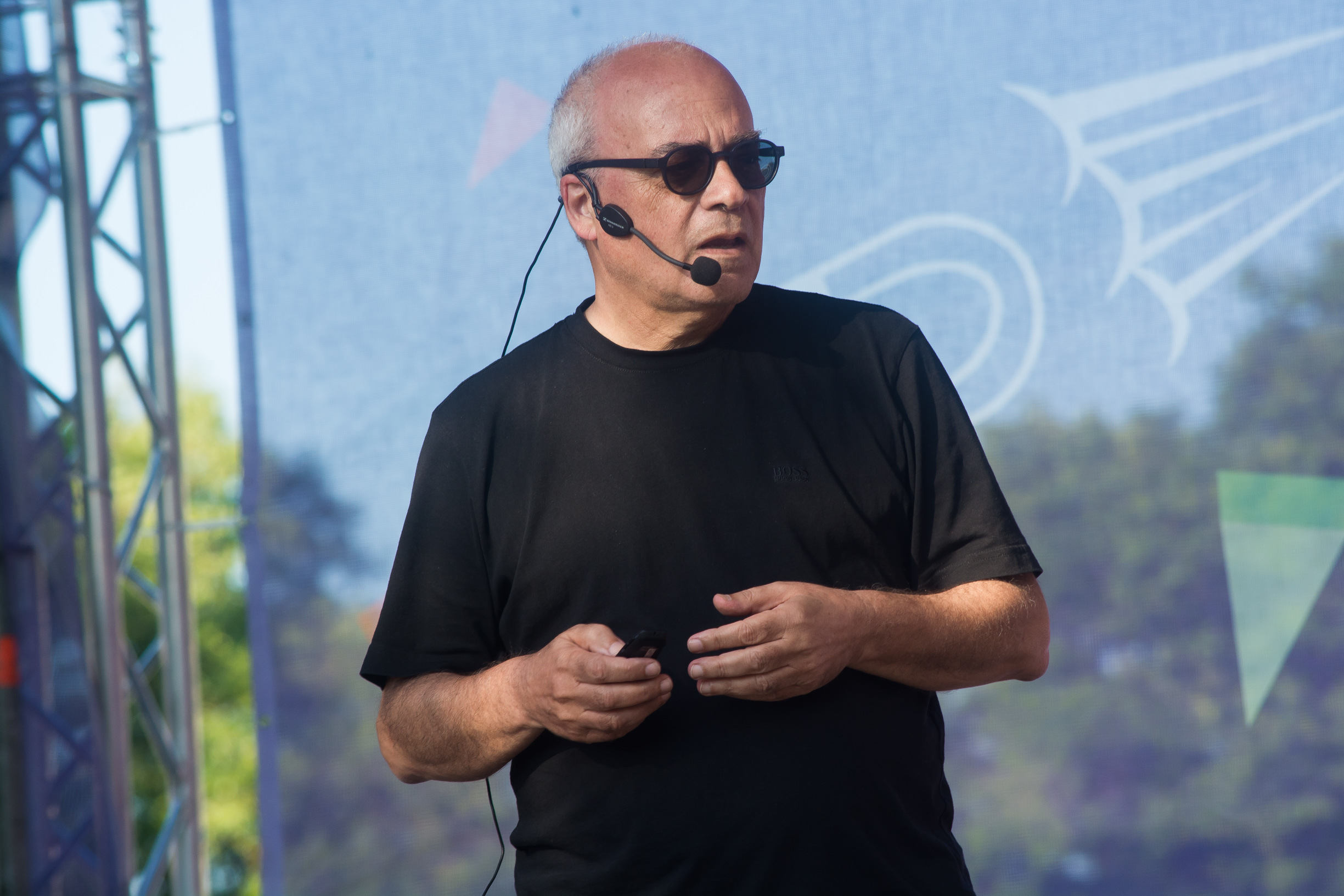 Леонель Моура (Leonel Moura) на Geek Picnic 2016 в Санкт-Петербурге